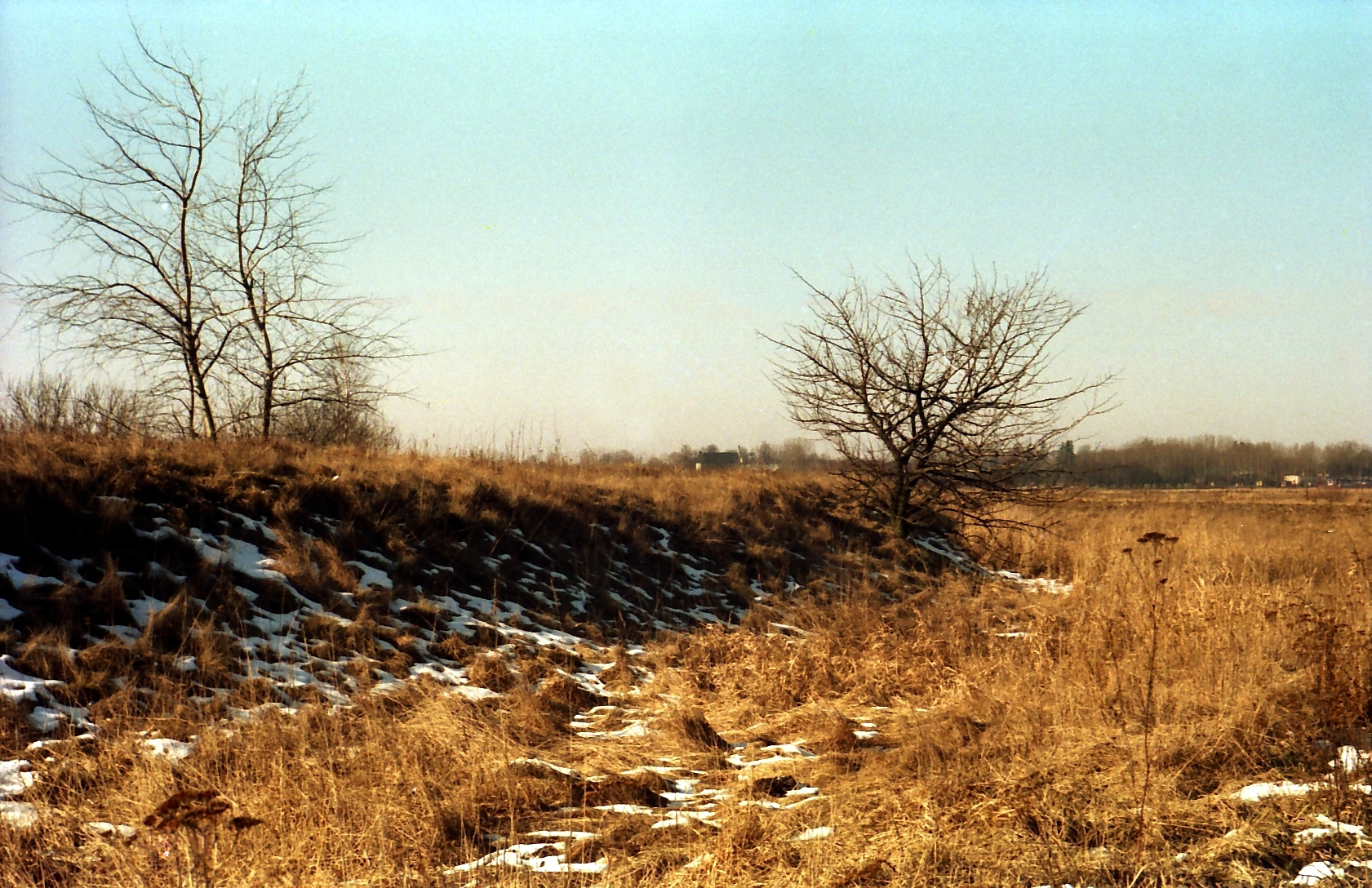 Zewnętrzne wały grodziska w roku 1993 (przed zniszczeniem).